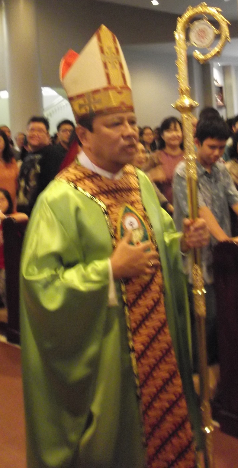 Uskup Agung Jakarta, Mgr. Ignatius Suharyo di Gereja Santo Yakobus, Kelapa Gading, Jakarta